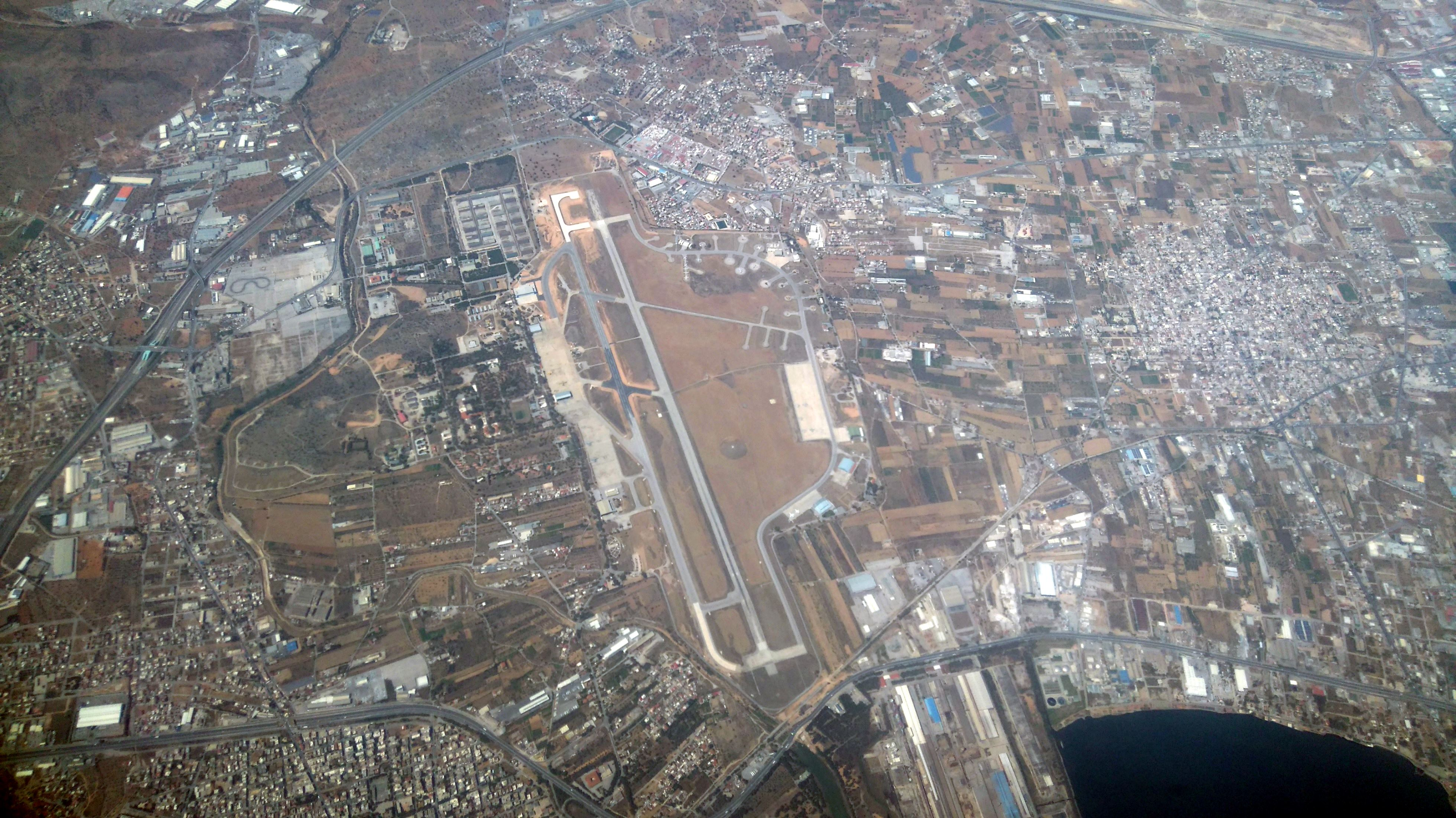 Αεροφωτογραφία Αεροδρόμιο Ελευσίνας